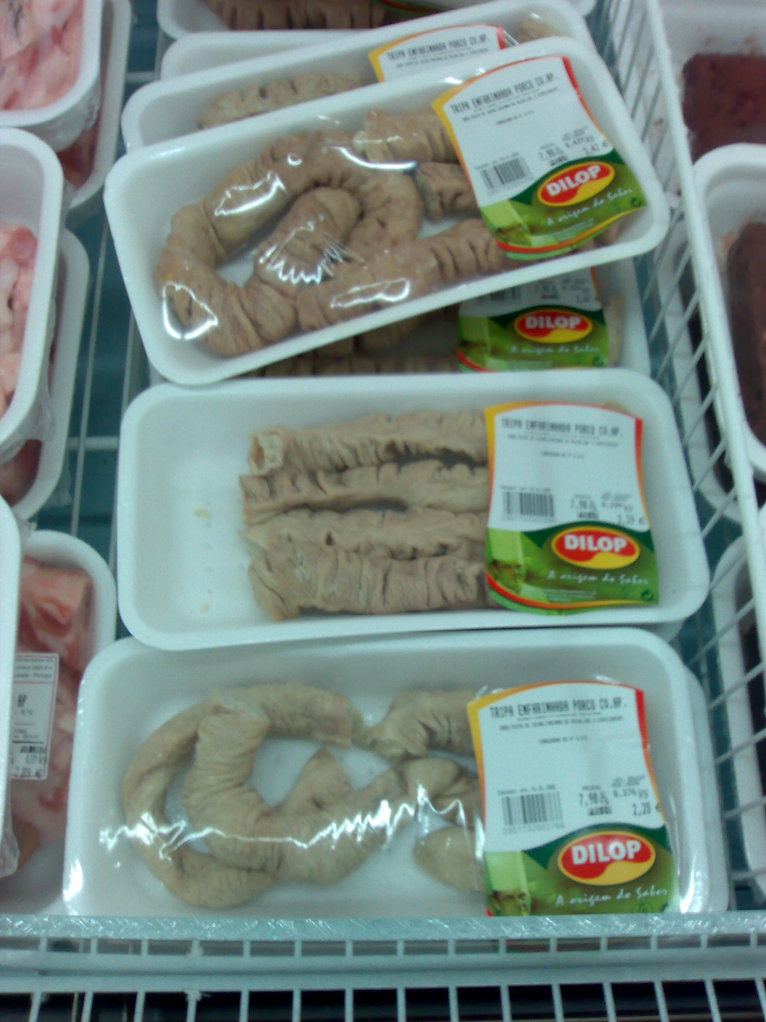 Tripas enfarinhadas (a portuguese sausage).